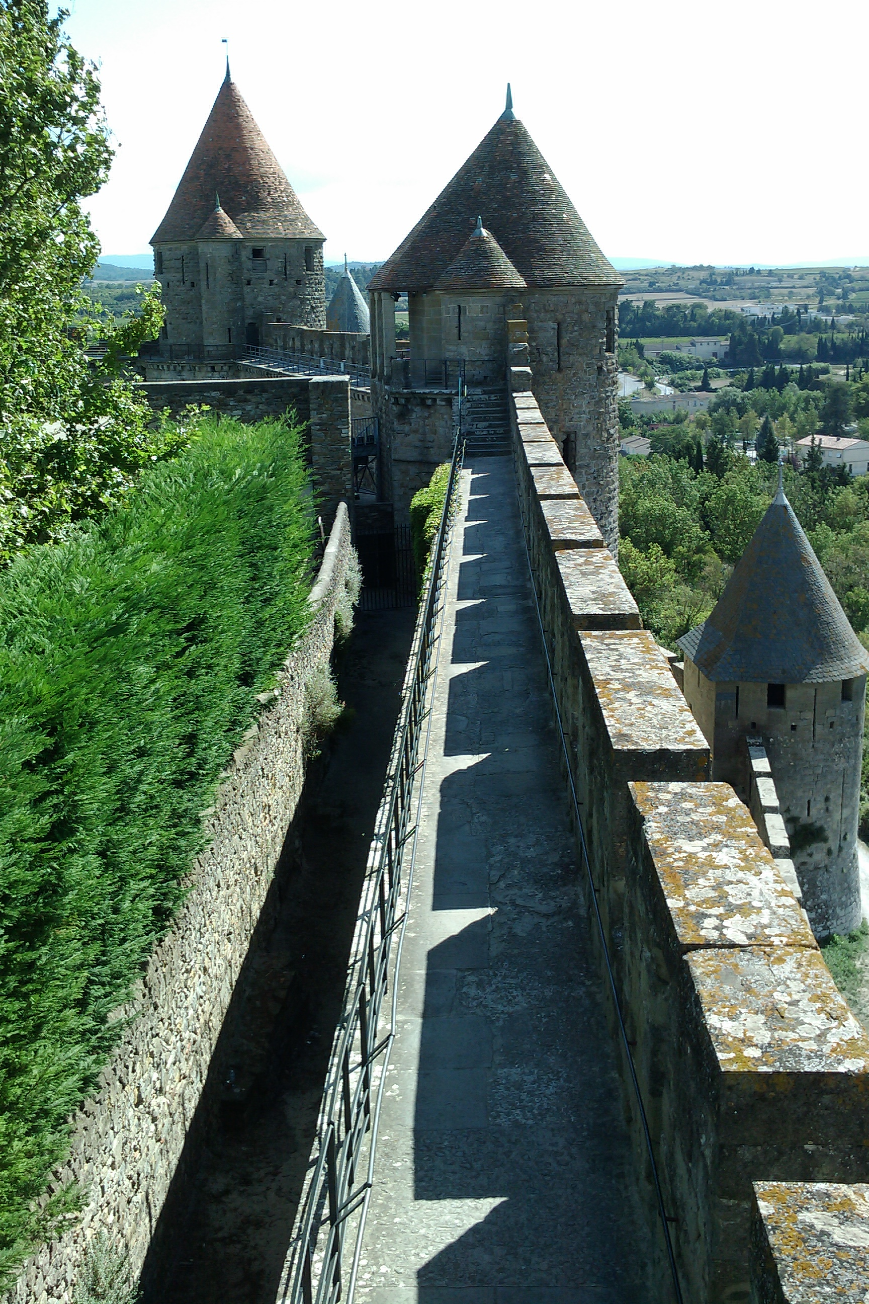 Remparts de la cité de Carcassone .